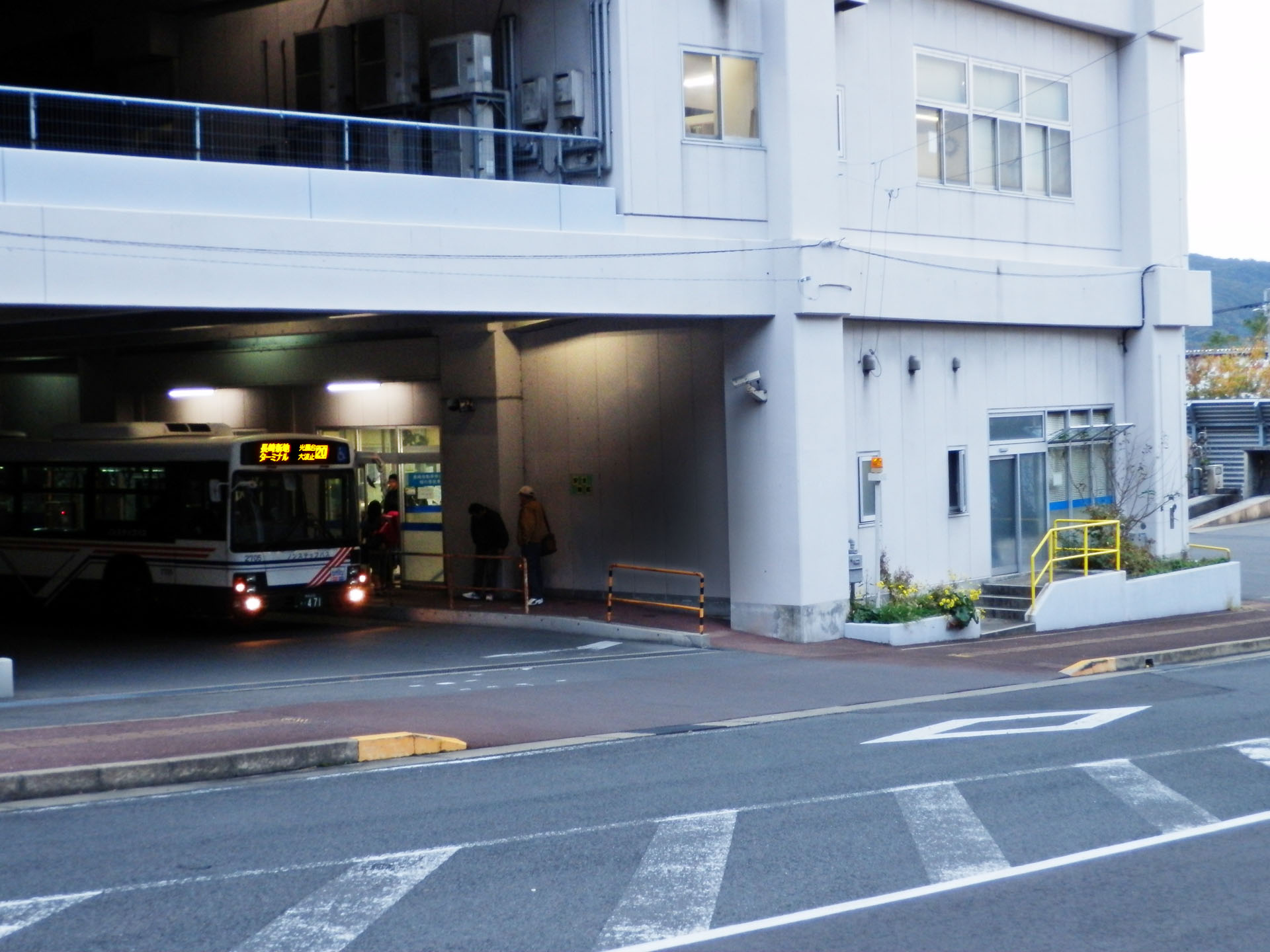 長崎バス桜の里ターミナル側面